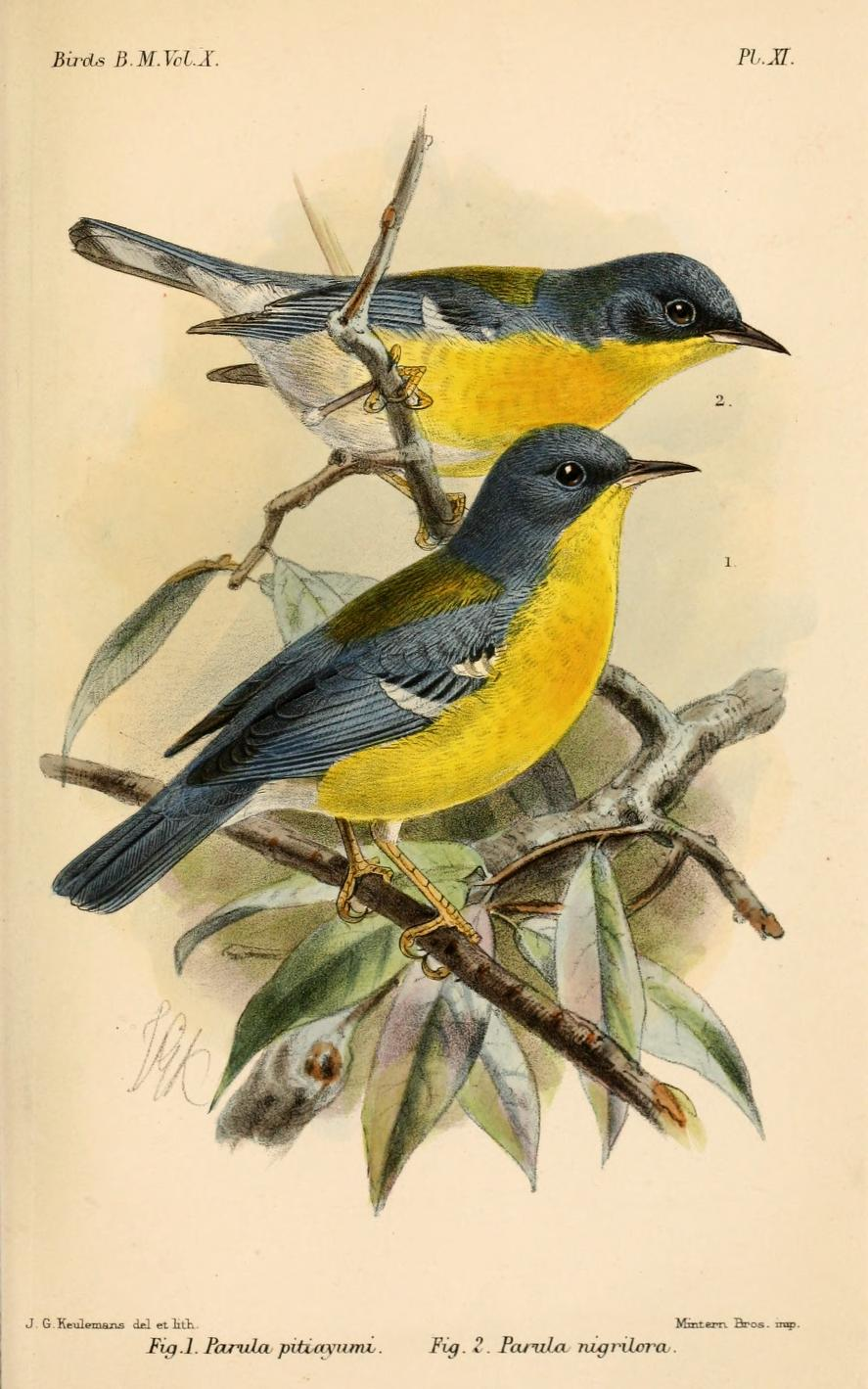 Parula pitiayumi, Tropical Parula (below); and Parula nigrilora = Parula pitiayumi nigrilora, Tropical Parula ssp. (above)